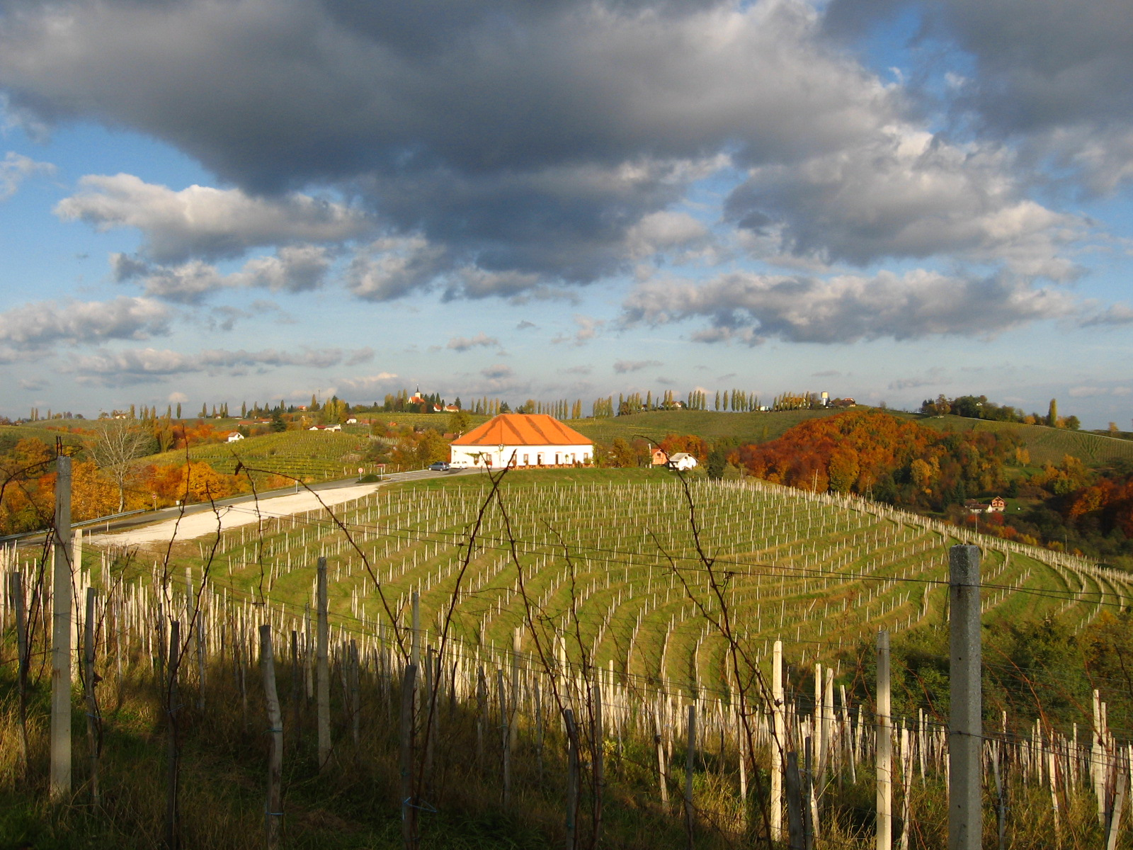 Zidanica Malek, Jeruzalem, Prlekija